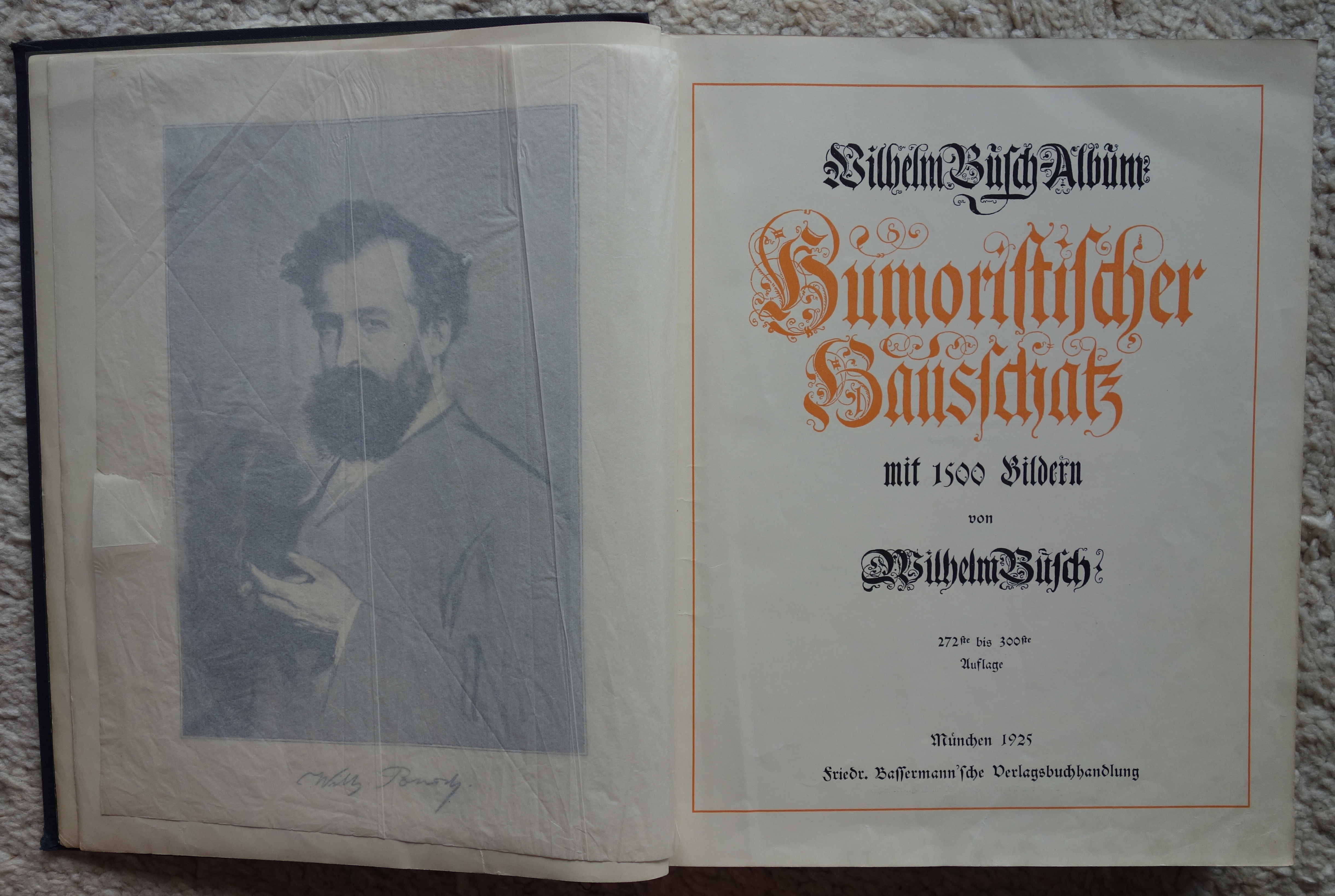 Wilhelm Busch Humoristischer Hausschatz 1925